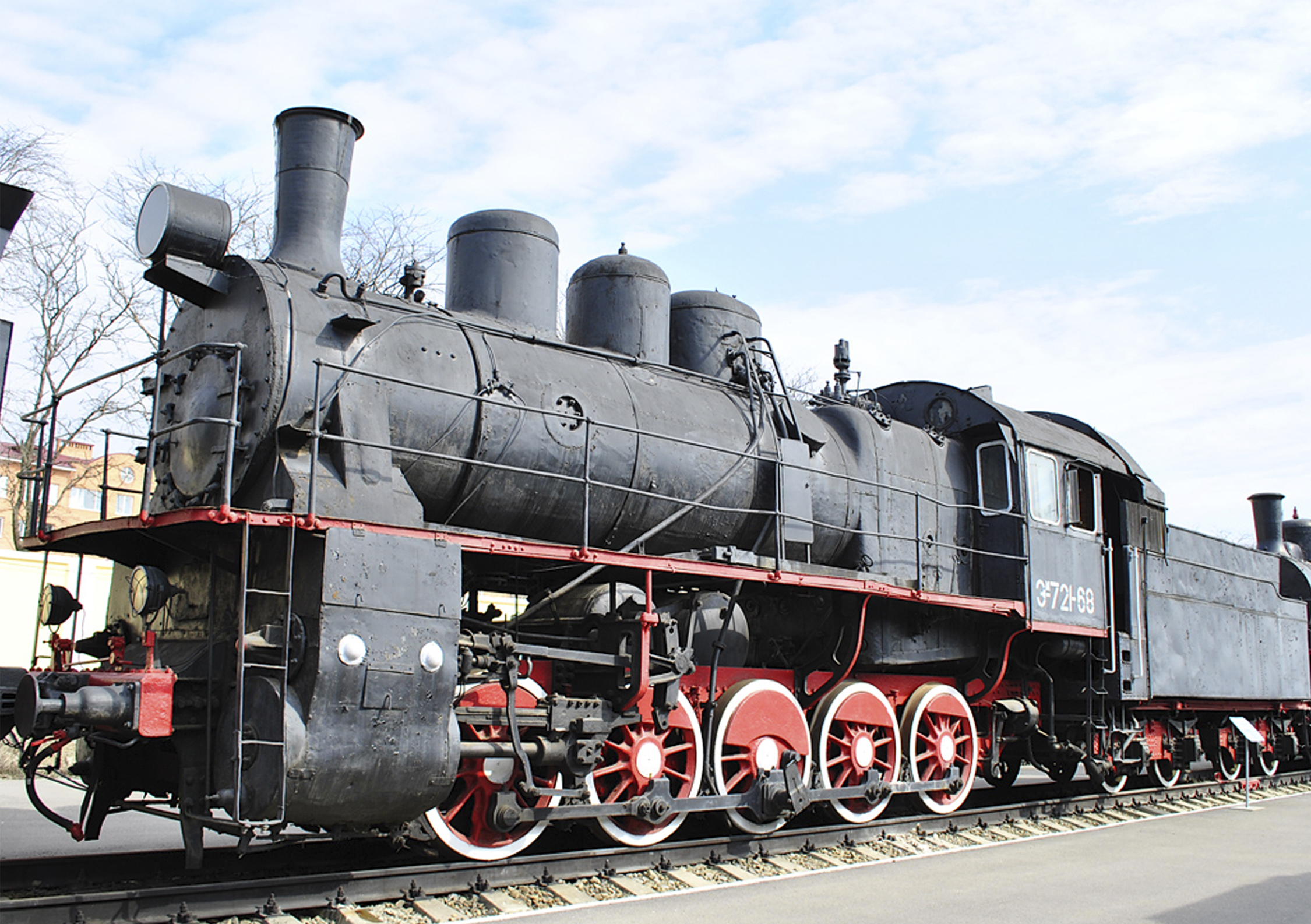 Паровоз построен в 1933 году Харьковским паровозостроительным заводом